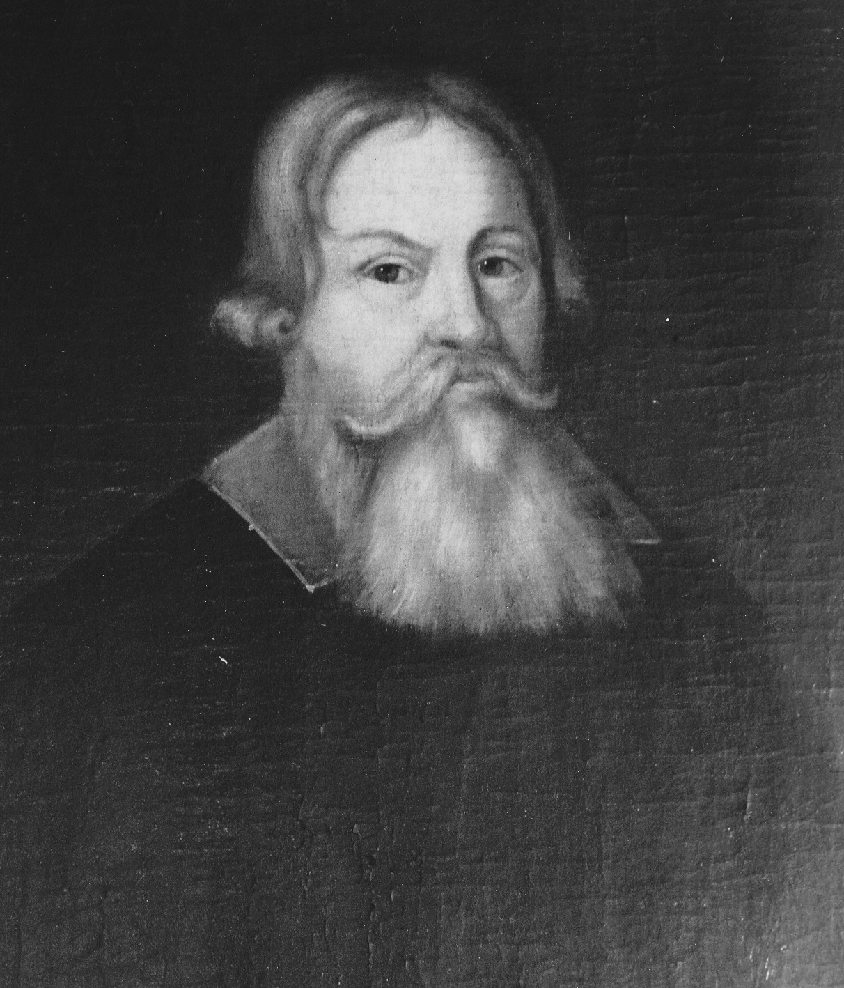 Olof Laurelius, originalet i Storkyrkans församlingssal.